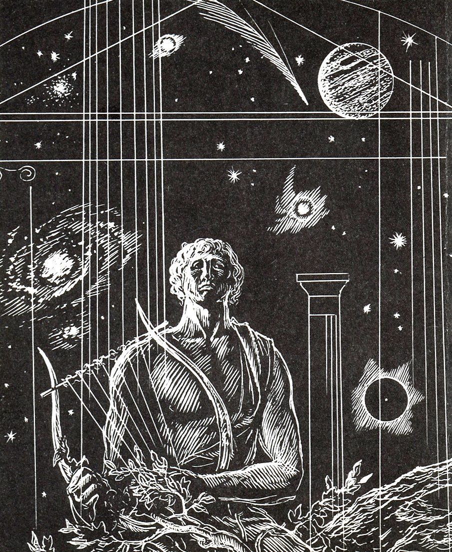 Аэд и космос. Аллегория. Фронтиспис книги "...И звезда с звездою говорит"